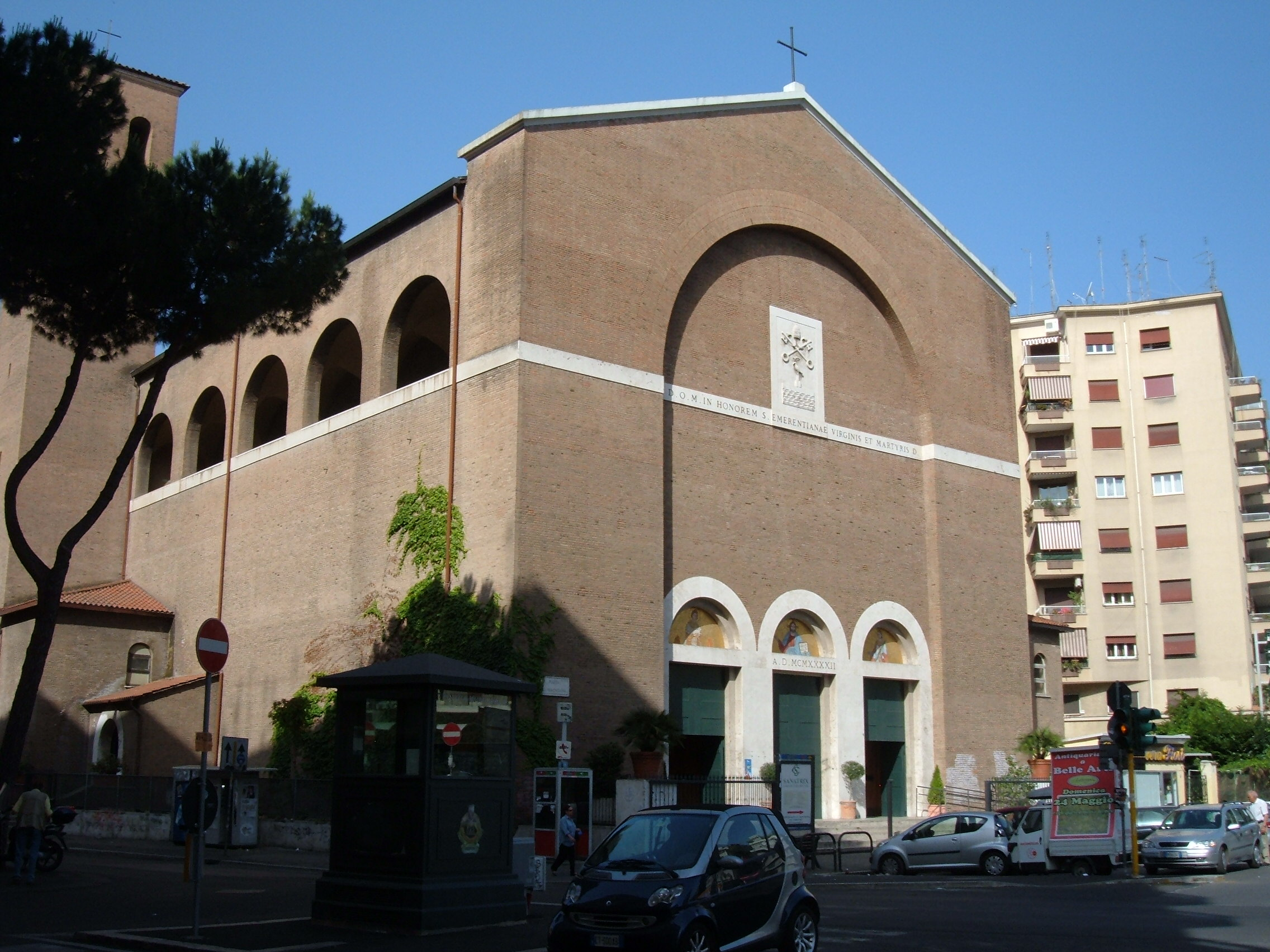 Chiesa di Santa Emerenziana, a Roma, nel quartiere Trieste.